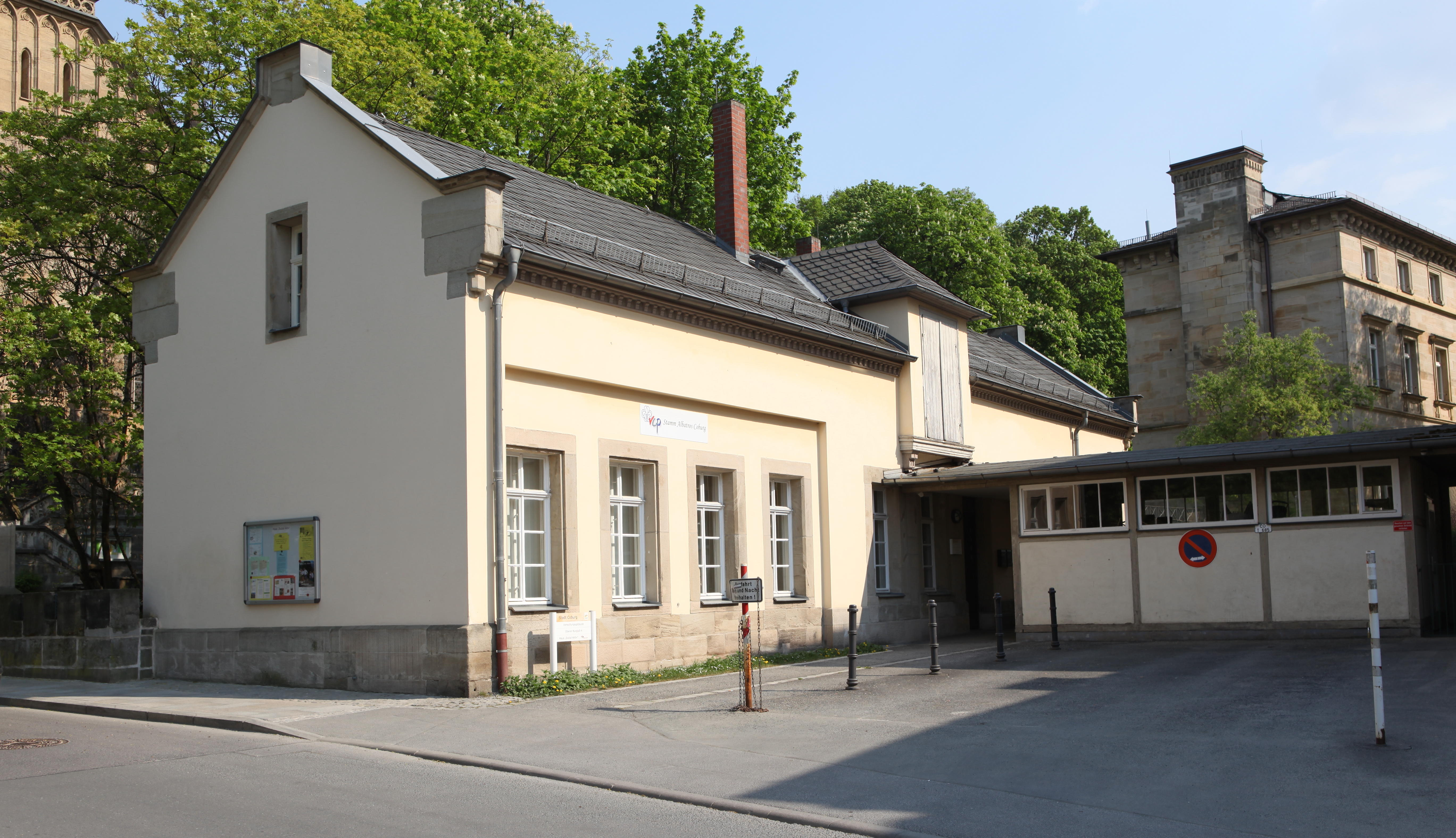 Oberer Bürglaß 4 in Coburg